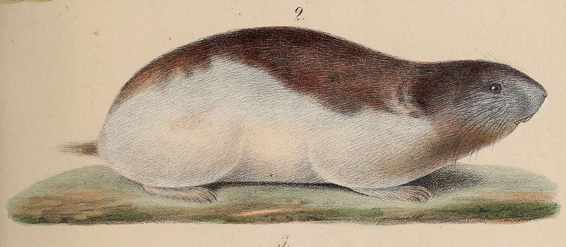 IV —.-^^T; v-r "^,' h-5^/s»'Ä't7'^' -^-;^: =: " .'^^J?^i^s^'-^'^~ -^ ,v.«^^ .^, /■/' /V//»^ // !^ .l?/////- .^^' i/rr/f'j /r/7///^y/// / . 4/v/////^/' -t .y//^^///r/ 7/ ^ '/V////